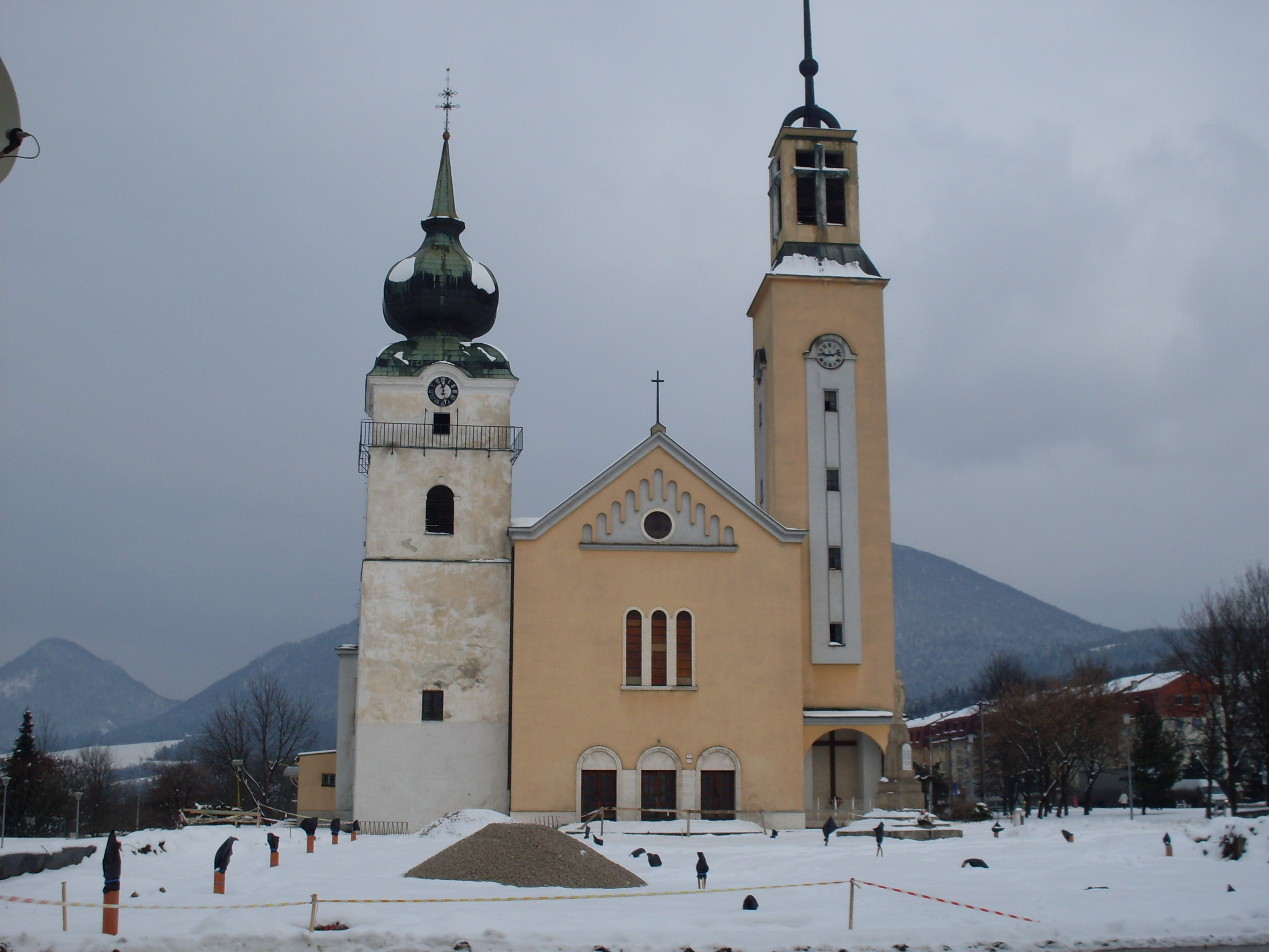 Fotky z mesta Považská Bystrica - rimsko-katolicky kostol